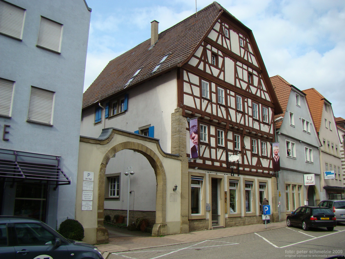 Historisches Gebäude Brettener Straße 32 in Eppingen